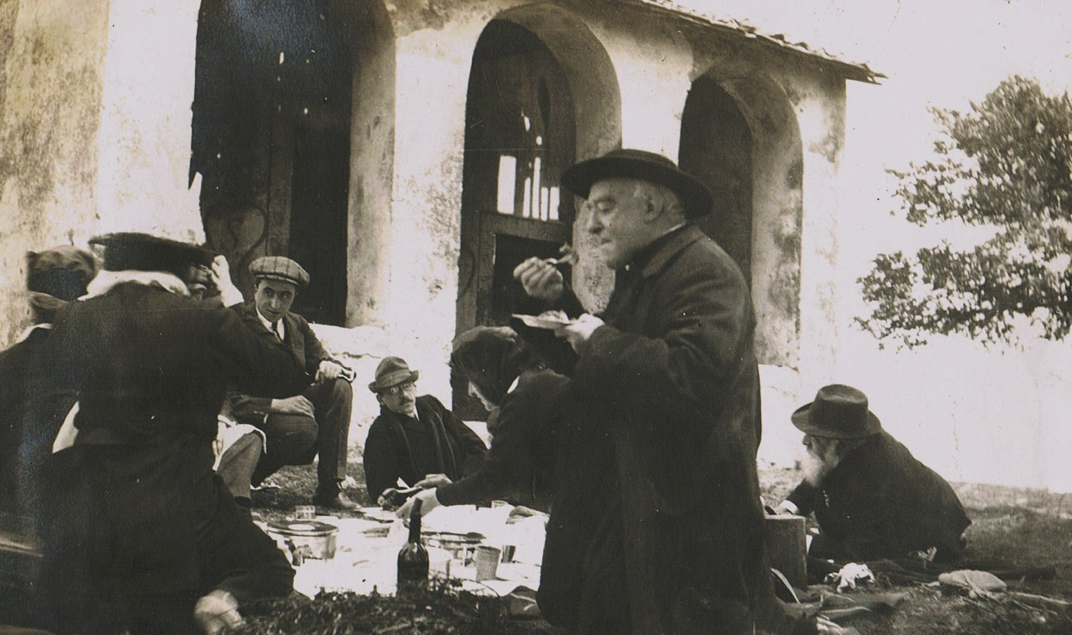 Louis Duchesne à l'avant-plan, au cours d'un pique-nique avec le futur conseiller d'Etat Louis Canet, assis au fond avec chapeau et lunettes, Napoleone Primoli, allongé à gauche. Photographe anonyme, légende photographique : Jean-François Miniac.